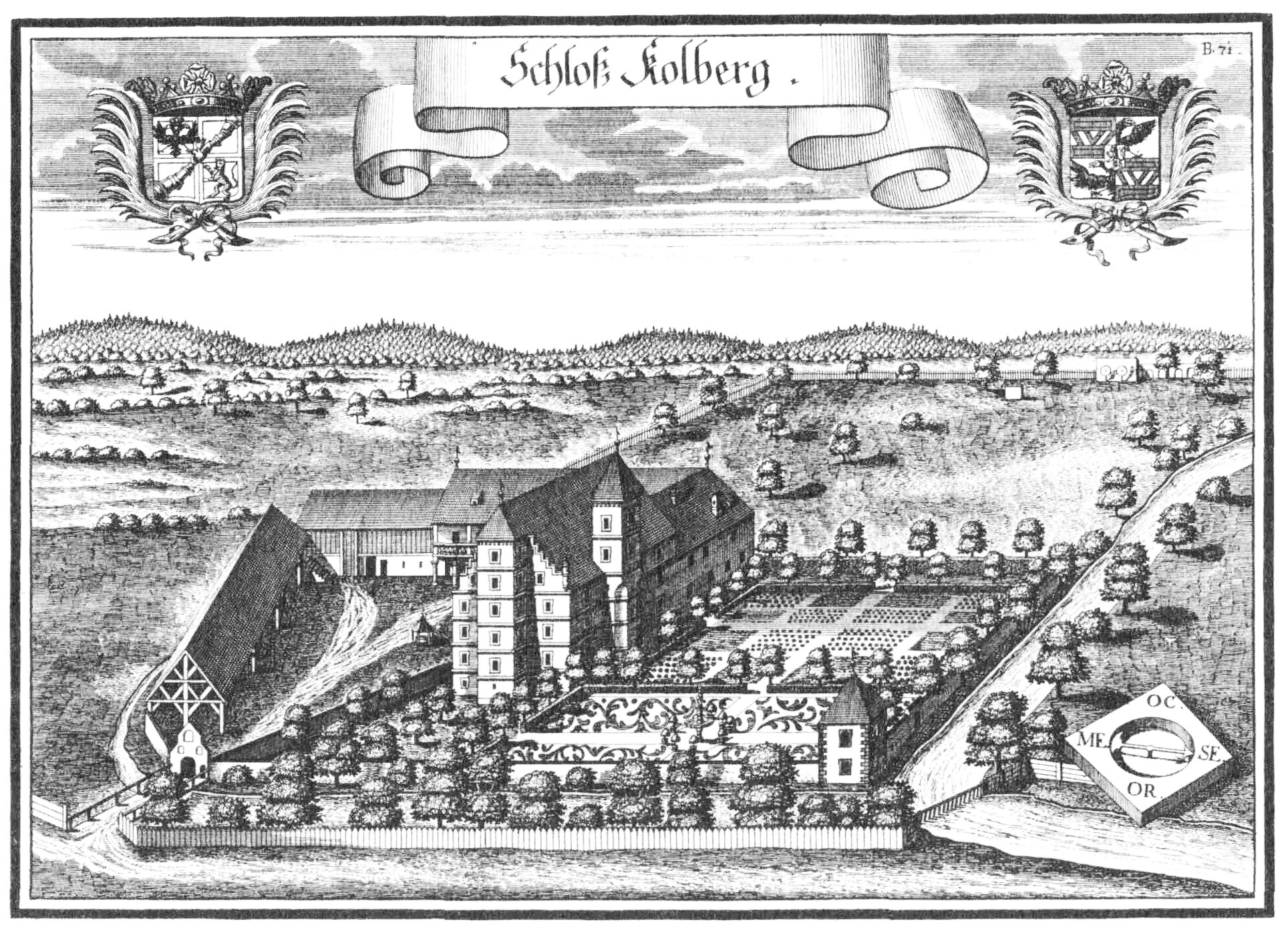 Schloss Kolberg nach einem Stich von Michael Wening von 1721